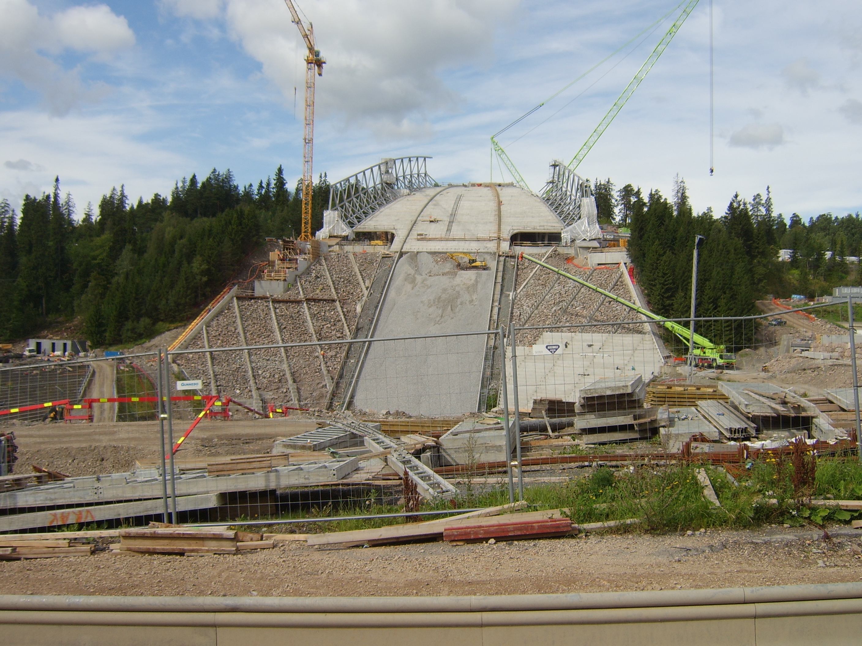 Bau der neuen Sprungschnanze in Holmenkollen - Stand August 2009